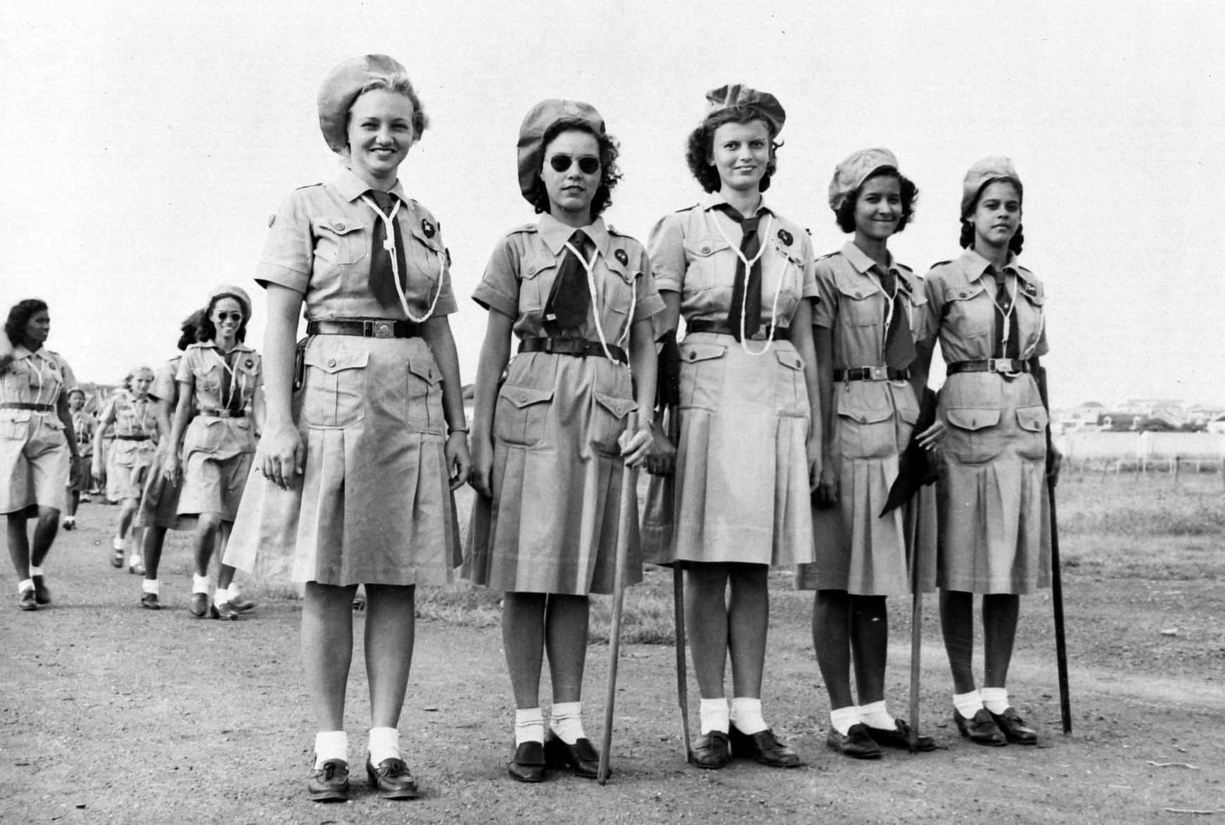 Repronegatief'Een groep padvindsters'1947Afmetingen van het werk: 9 x 12cm (3 9/16 x 4 3/4in.)